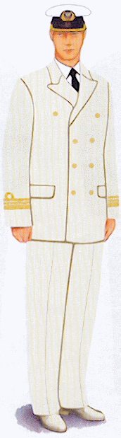 Rysunek ten pochodzi z załącznika do rozporządzenia ministra obrony narodowej z dnia 2 grudnia 2004 r. w sprawie wzorów oraz noszenia umundurowania i oznak wojskowych przez żołnierzy zawodowych i kandydatów na żołnierzy zawodowych.